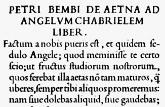 Originalschnitt der De-Aetna-Type (die als "Bembo" nachgezeichnet wurde) mit langen Oberlängen (Pietro Bembo: De Aetna. Venice: Aldus manutius, 1495.)